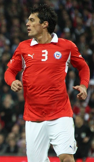 Marcos González jugando por la Selección de Chile